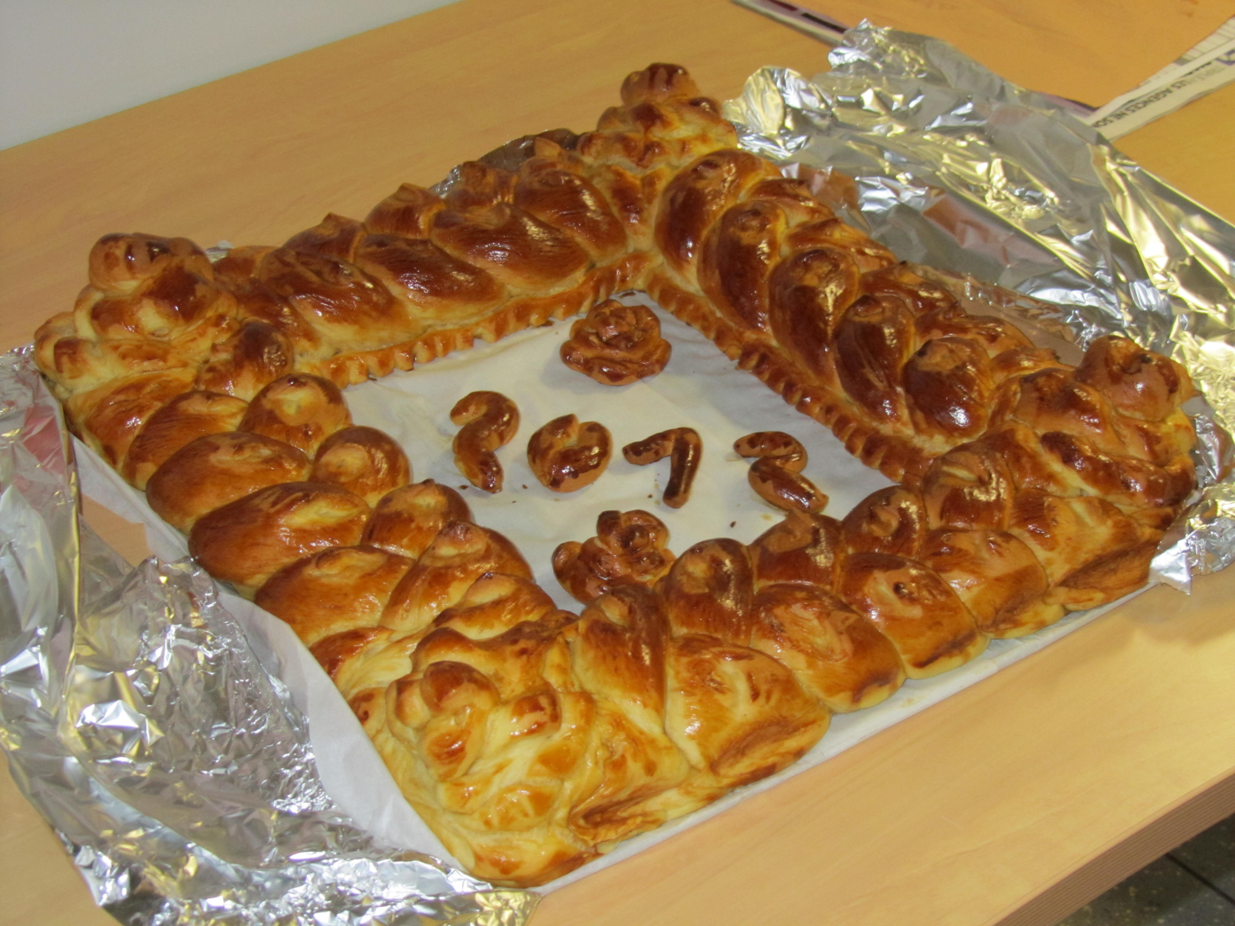 Pain au beurre traditionnellement servi avec un bol de chocolat chaud dit "chocolat de première communion".